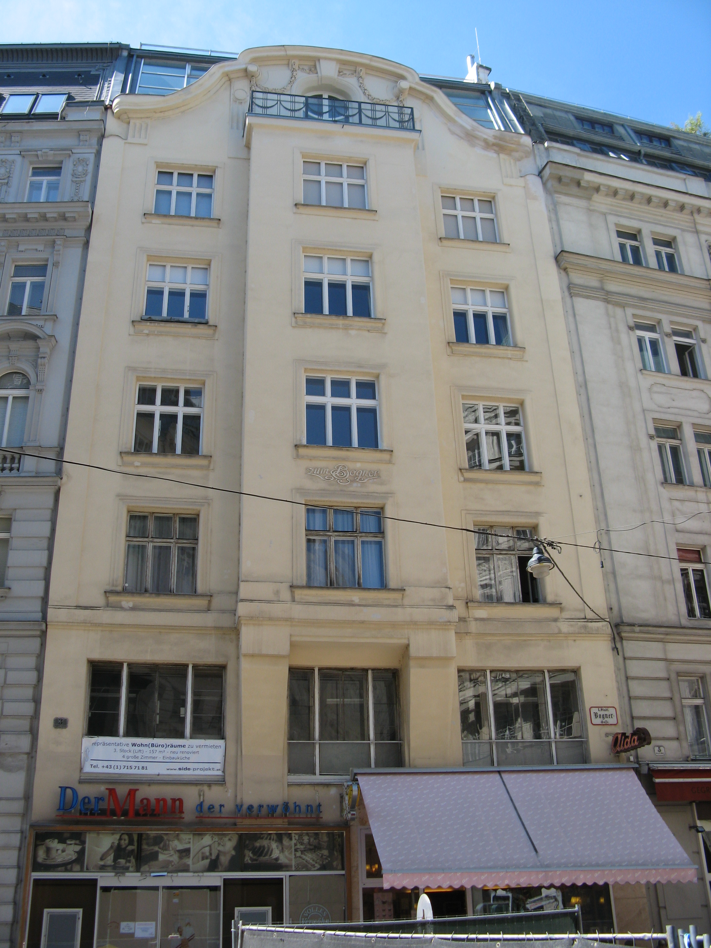 Wohnhaus "Zum Bogner" (1901) von Franz von Krauss und Josef Tölk, Bognergasse 3, Wien-Innere Stadt